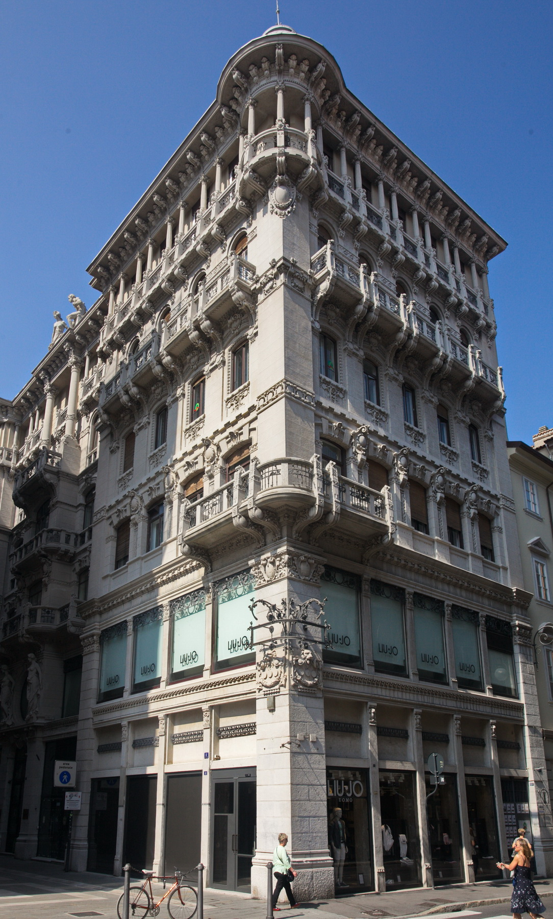 Casa Terni Smolars (1906). Via Dante Alighieri 6. Trieste Romeo Depaoli, architect Romeo Rathmann, sculptor